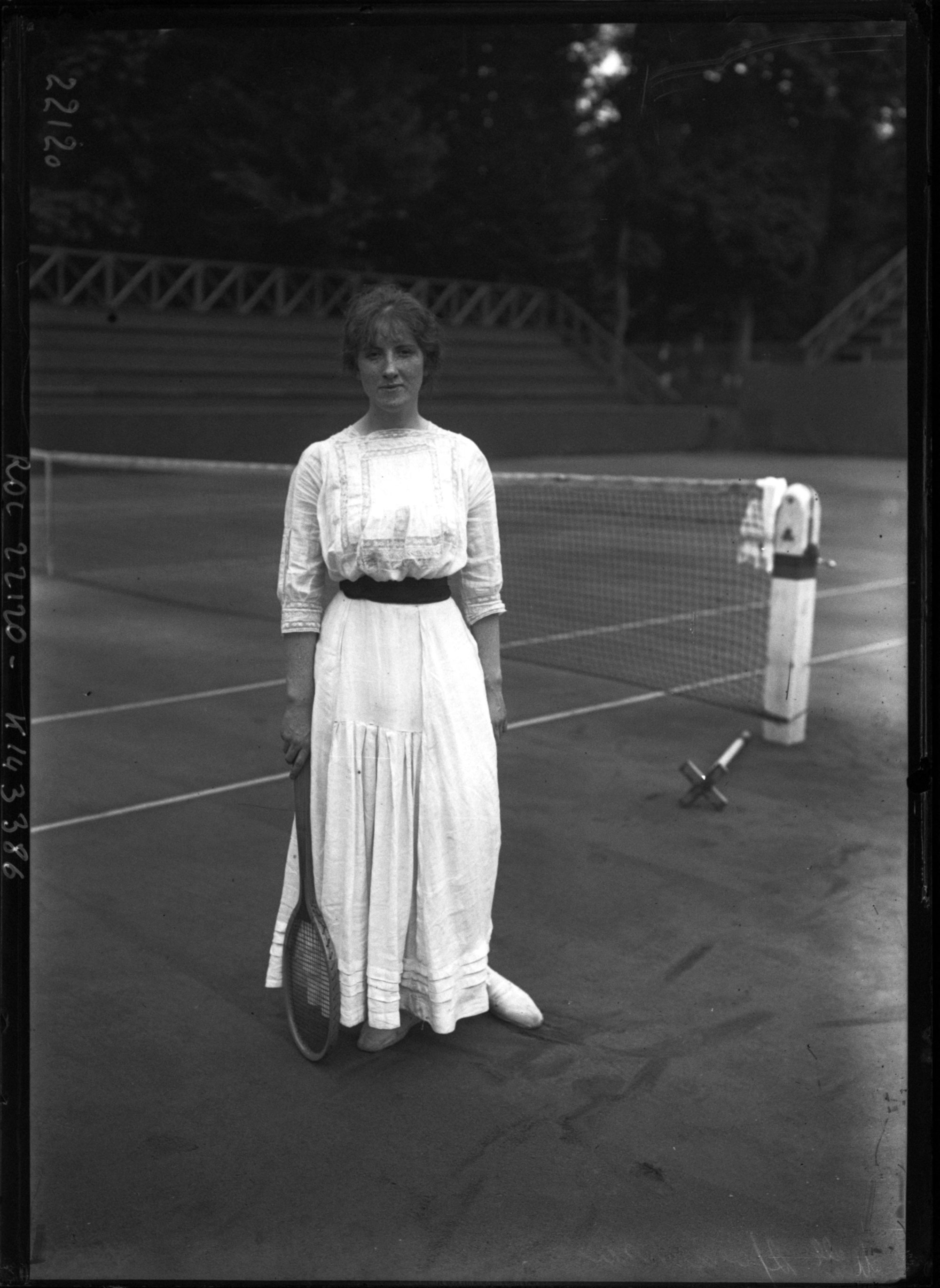 Daisy Speranza